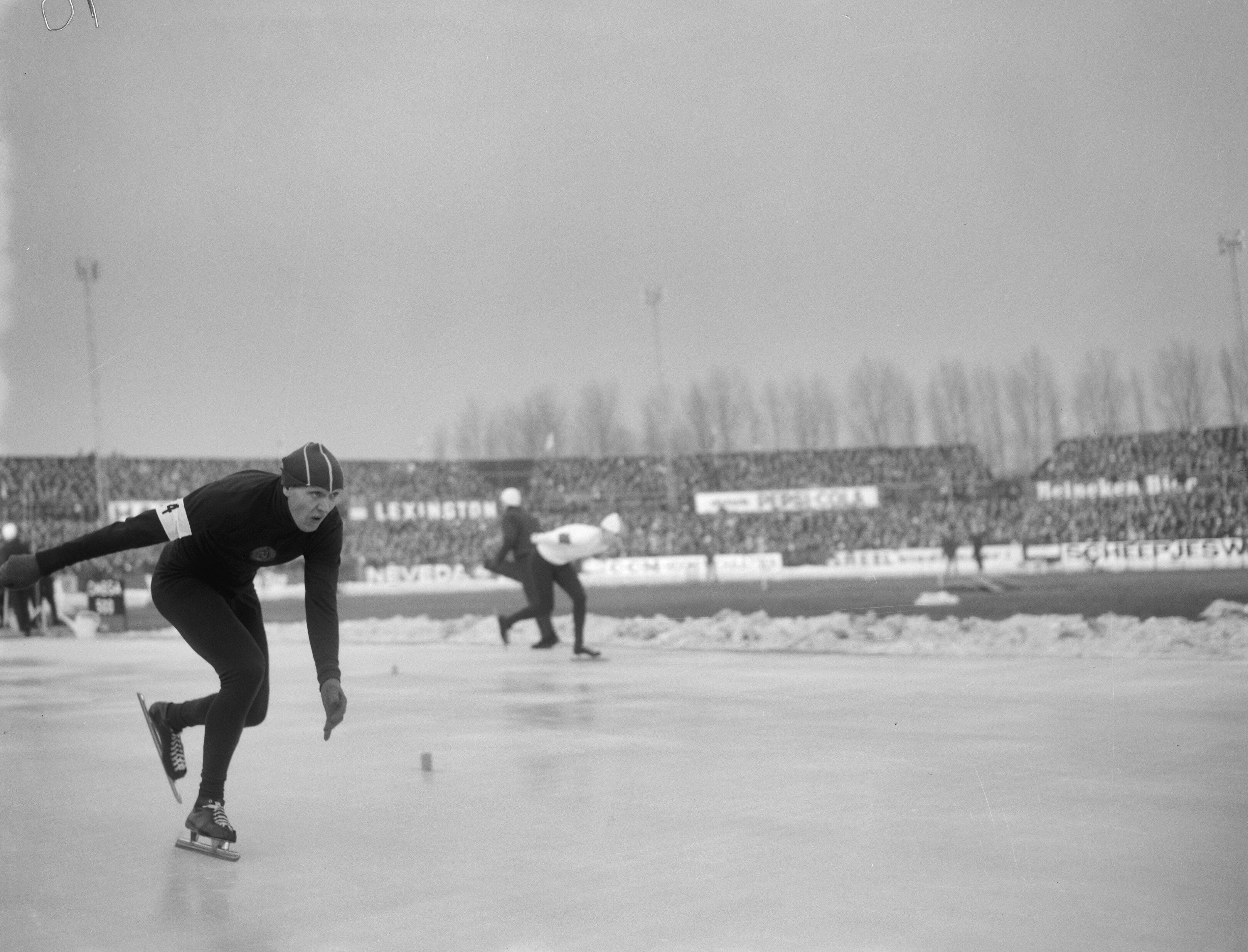 Collectie / Archief : Fotocollectie Anefo Reportage / Serie : [ onbekend ] Beschrijving : Europese Schaatskampioenschappen te Deventer, nummer 24 V. Kositchkin in aktie Datum : 22 januari 1966 Locatie : Deventer Trefwoorden : SCHAATSKAMPIOENSCHAPPEN Persoonsnaam : V. Kositchkin Fotograaf : Bilsen, Joop van / Anefo Auteursrechthebbende : Nationaal Archief Materiaalsoort : Negatief (zwart/wit) Nummer archiefinventaris : bekijk toegang 2.24.01.04 Bestanddeelnummer : 918-7065